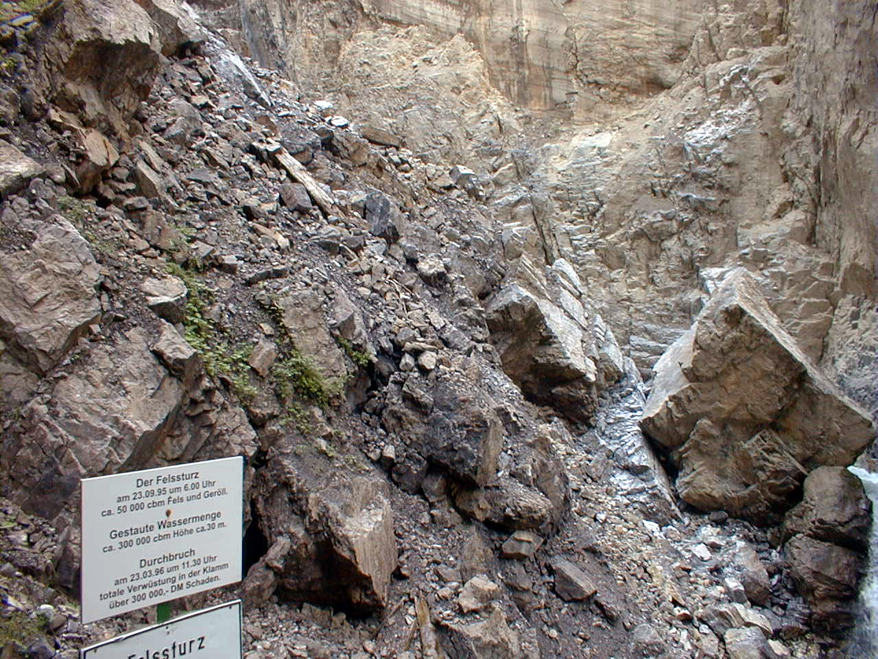 Felssturz in der Breitachklamm (Allgäu) von 1995